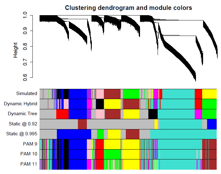 Сверху приведена дендрограмма, полученная из матрицы коэкспрессии генов с помощью иерархической кластеризации. Внизу приведено разбиение на кластеры различными методами: исходные кластеры (simulated), динамический гибридный, dynamic tree cut, статический метод при двух уровнях обрезки, метод k-ближайших медоидов при разных k.